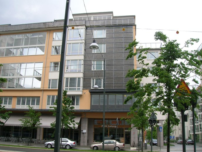 Solar panels on a house, Södra Hammarbyhamnen, Stockholm, Sweden